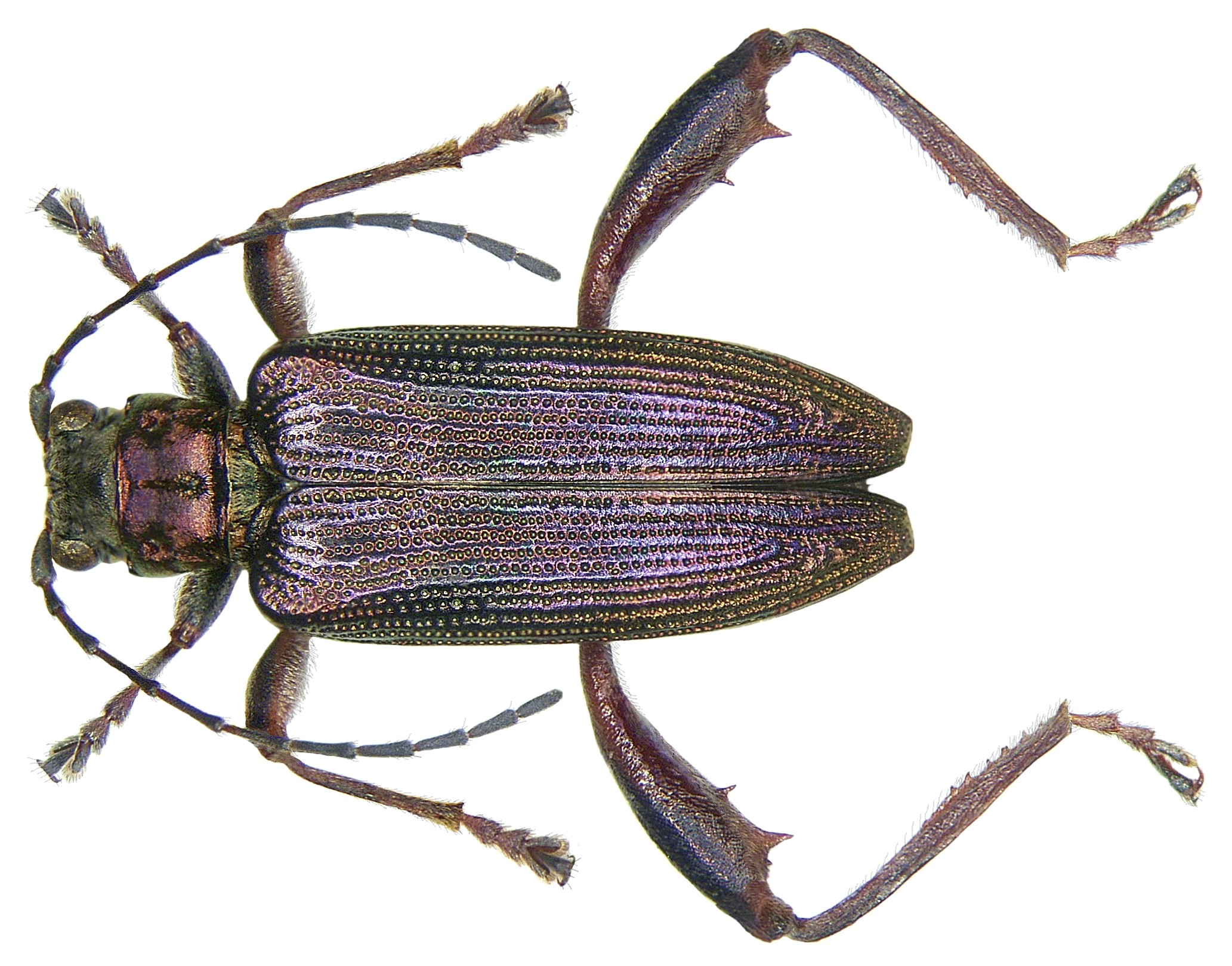 Donacia crassipes Fabricius, 1775 Familie: Chrysomelidae Grösse: 9-11 mm Verbeitung: Europa Ökologie: an Nymphaea alba und Nuphar luteum Fundort: Germania, Oberbayern, Kochelsee leg. det. U.Schmidt, 1975 Foto: U.Schmidt, 2007